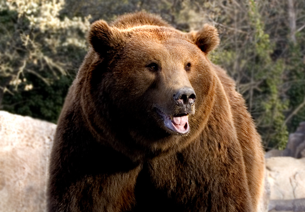 Oso pardo en el Zoo de Madrid, España.